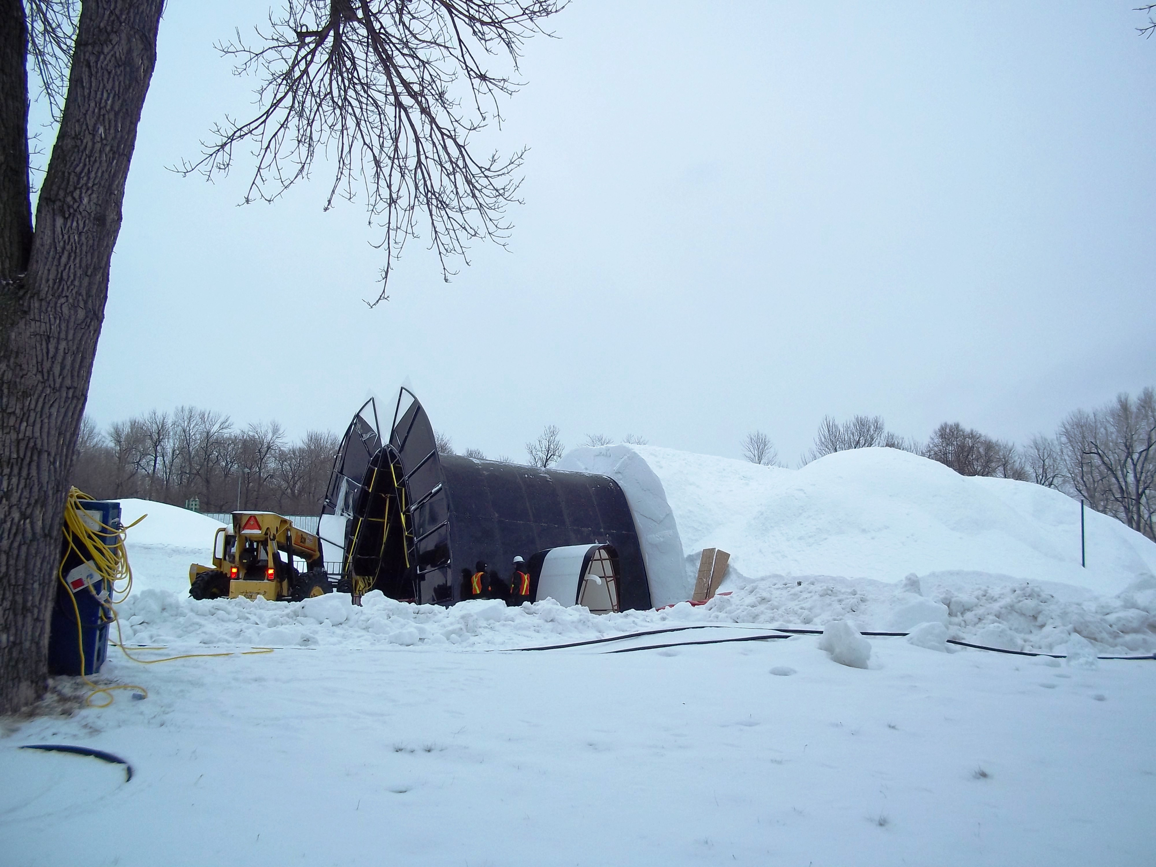 Village des neiges, Île Sainte-Hélène, Montréal